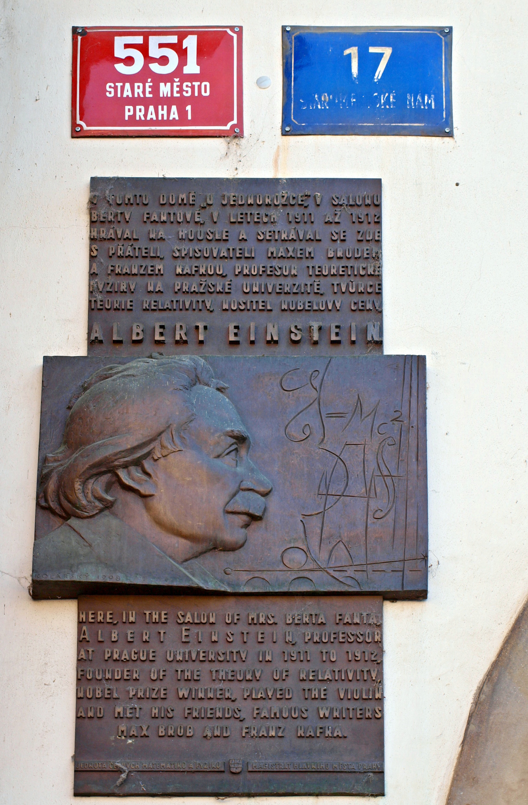 Staroměstské náměstí, Dům U bílého jednorožce, též U Kamenného beránka, salon Berty Fantové